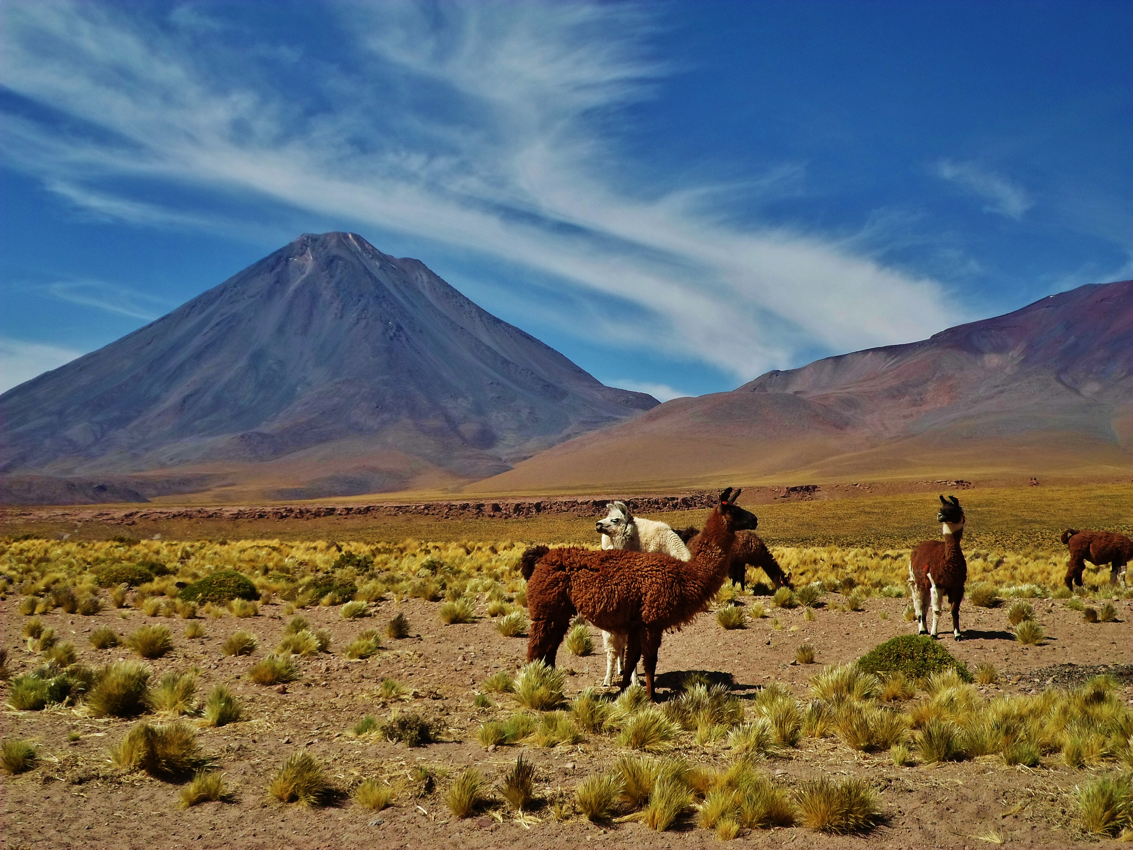 Llamas, y al fondo el volcan Licancabur, Atacama, Chile